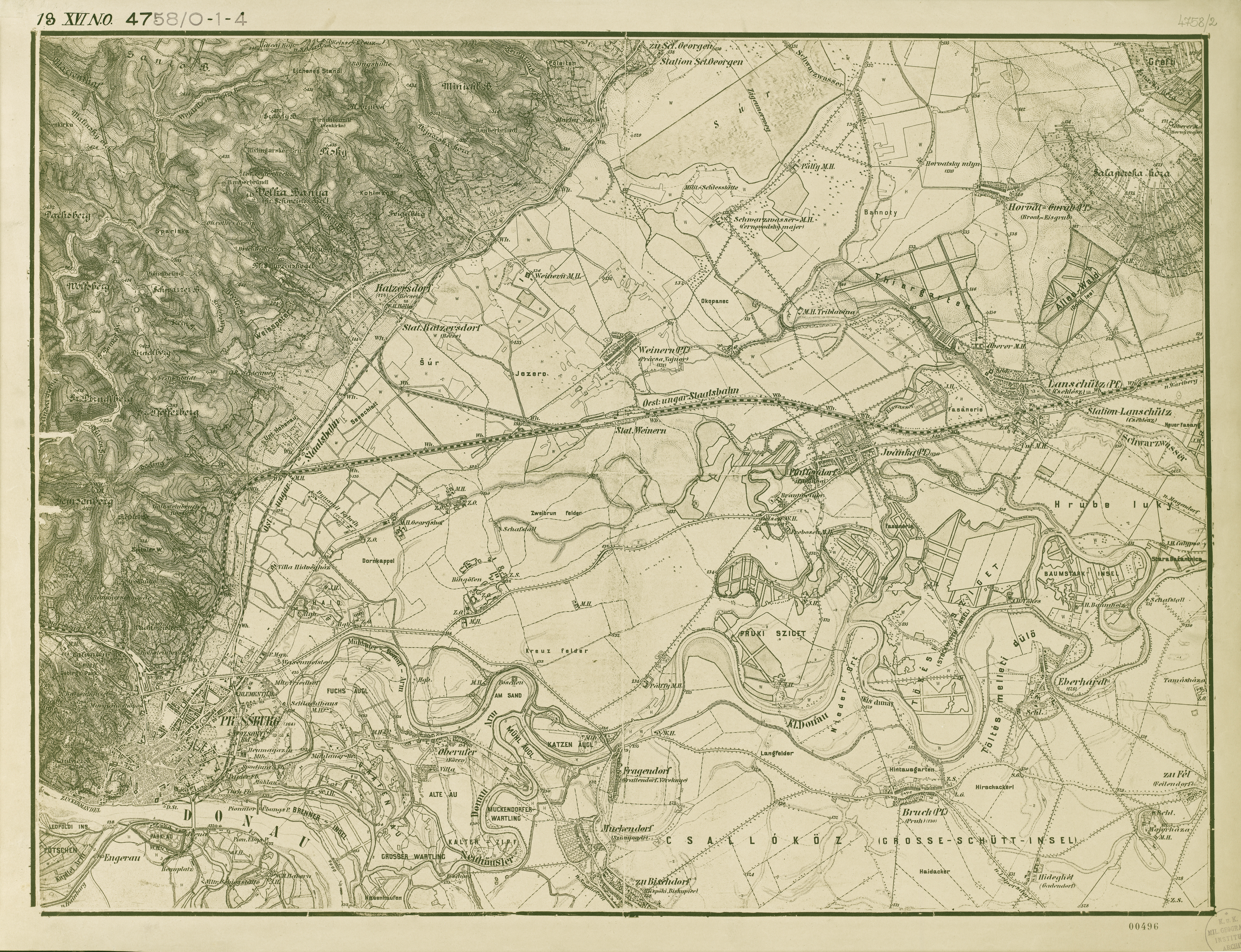 historische Landkarte: Arbeitsfassung von: Gradkartenblatt Zone 13 Colonne XVI Section NO (Nordost) (später 4758/2). Pressburg / Pozsony / Bratislava und östliche Umgebung. Franzisco-josephinische (3.) Landesaufnahme der österreichisch-ungarischen Monarchie. Maßstab 1:25.000.